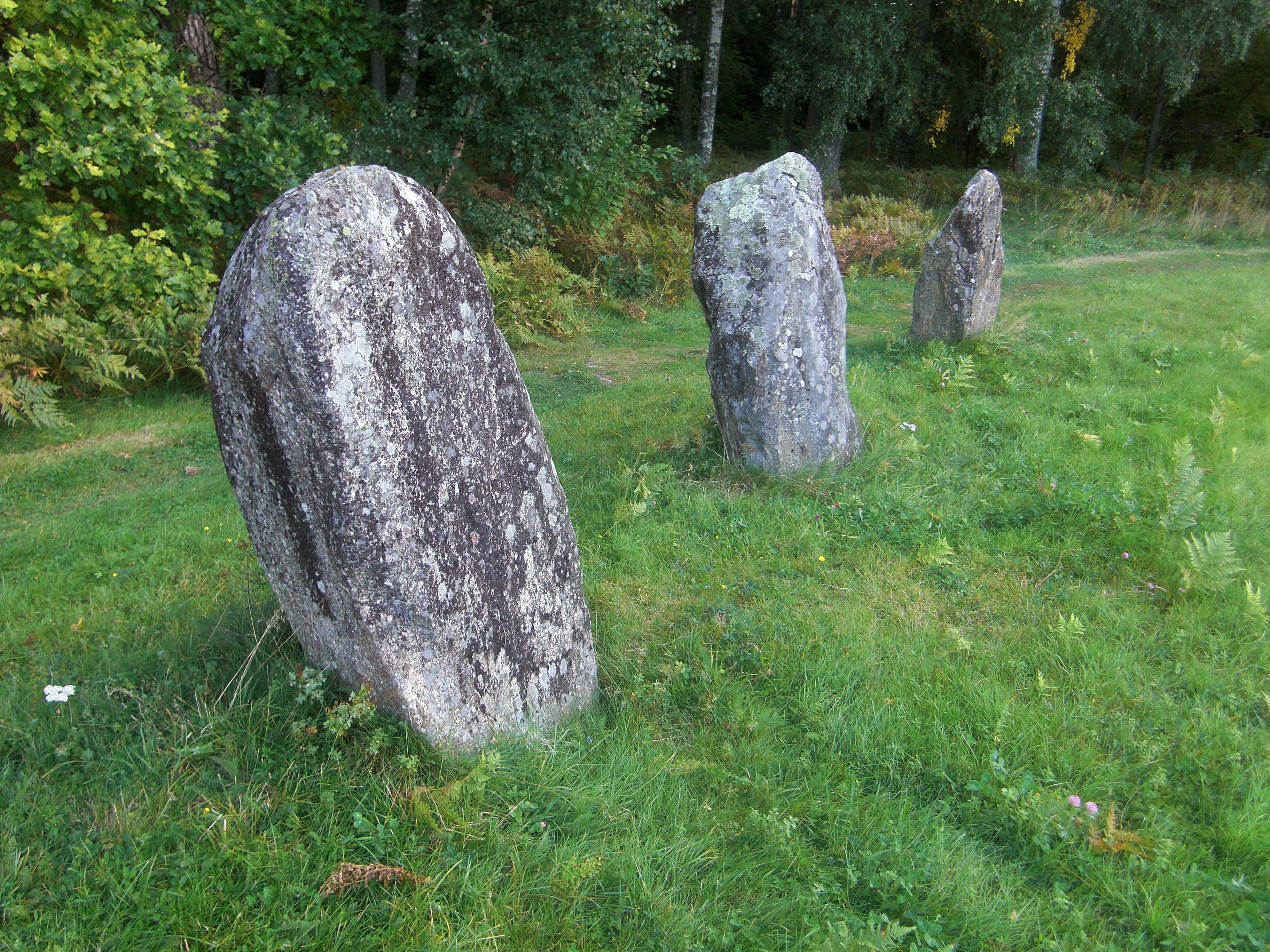 Skeppssättning vid Anundshög (Raä-nr Västerås 431:1) i Västerås kommun, Västmanland, Sverige.